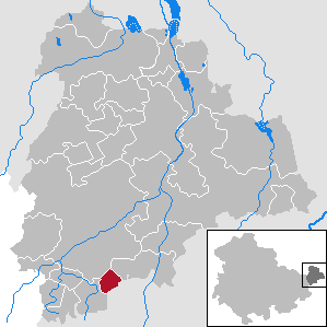 Heyersdorf in Thuringia - District Altenburger Land